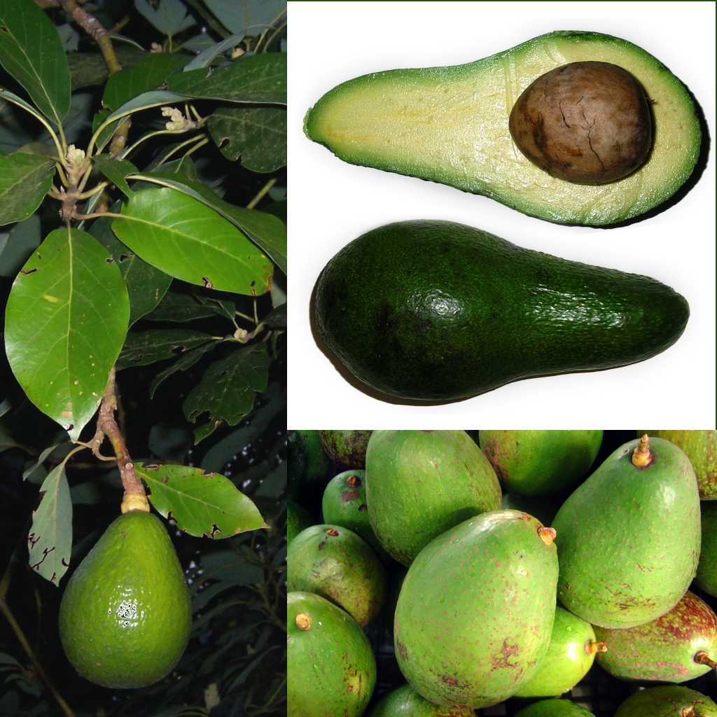 Grafika podręcznika Wikijunior:Owoce. Awokado właściwe (Persea americana).